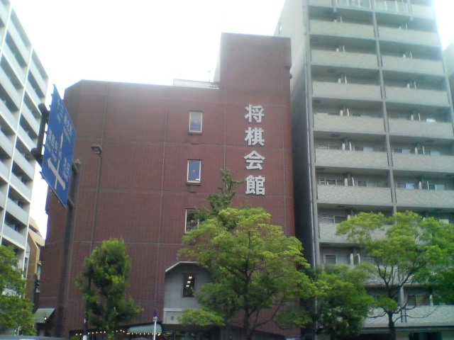 Kansai Shogi Kaikan, at osaka City, Japan.